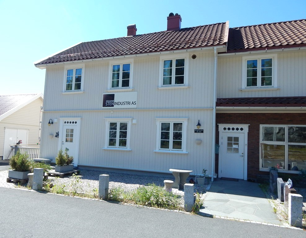 Vadfoss stasjon ved den nedlagte Kragerøbanen (Kragerølinjen)